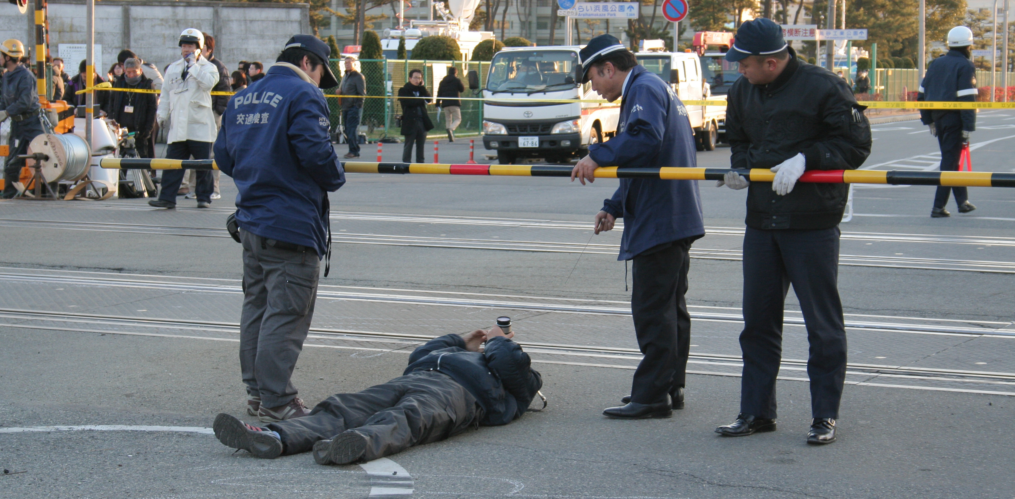 2013年2月12日。日本国兵庫県高砂市山陽電鉄本線荒井駅西側にて発生した特急列車脱線事故の写真。